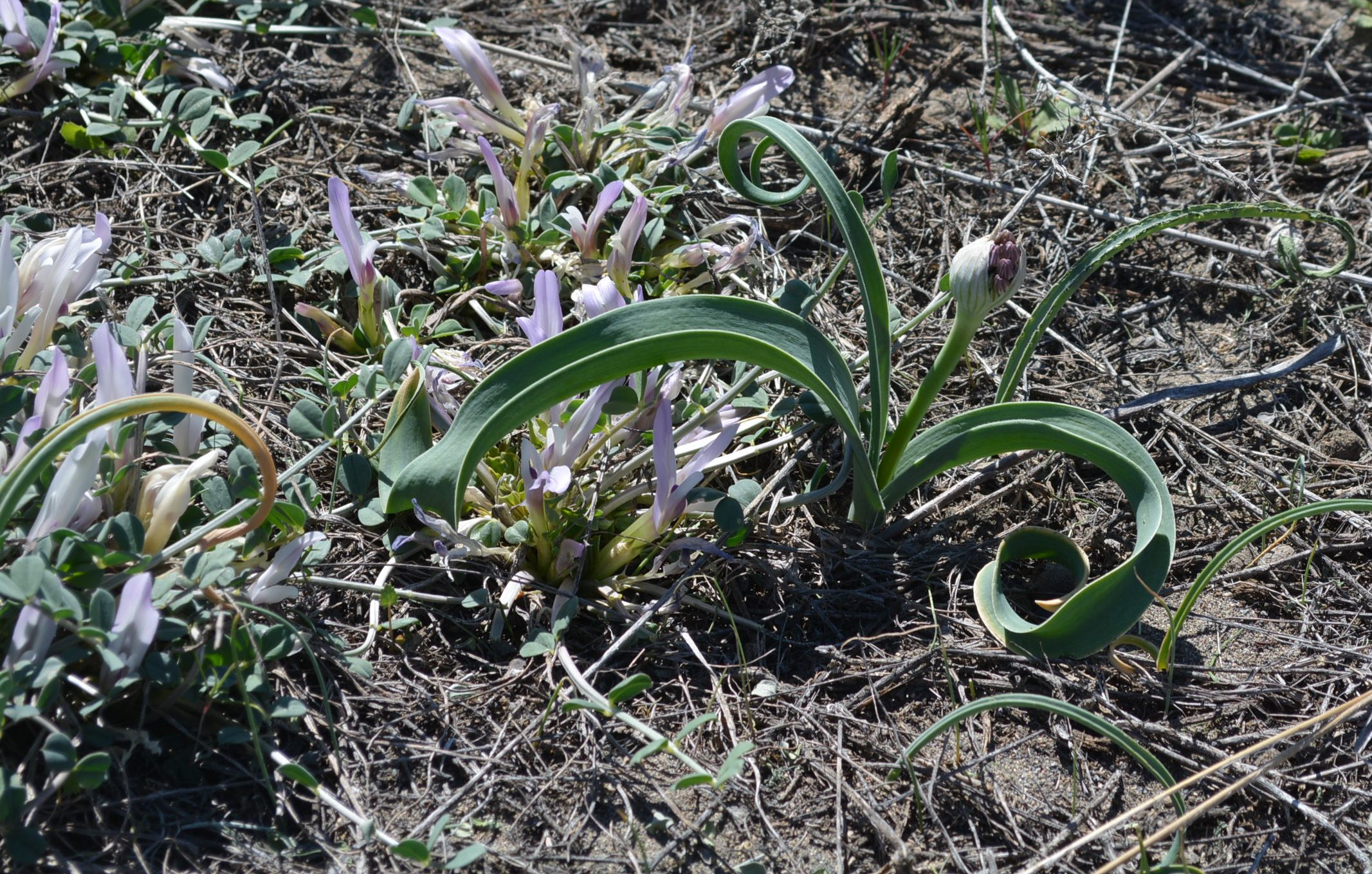 Գոռավանի ավազուտներ